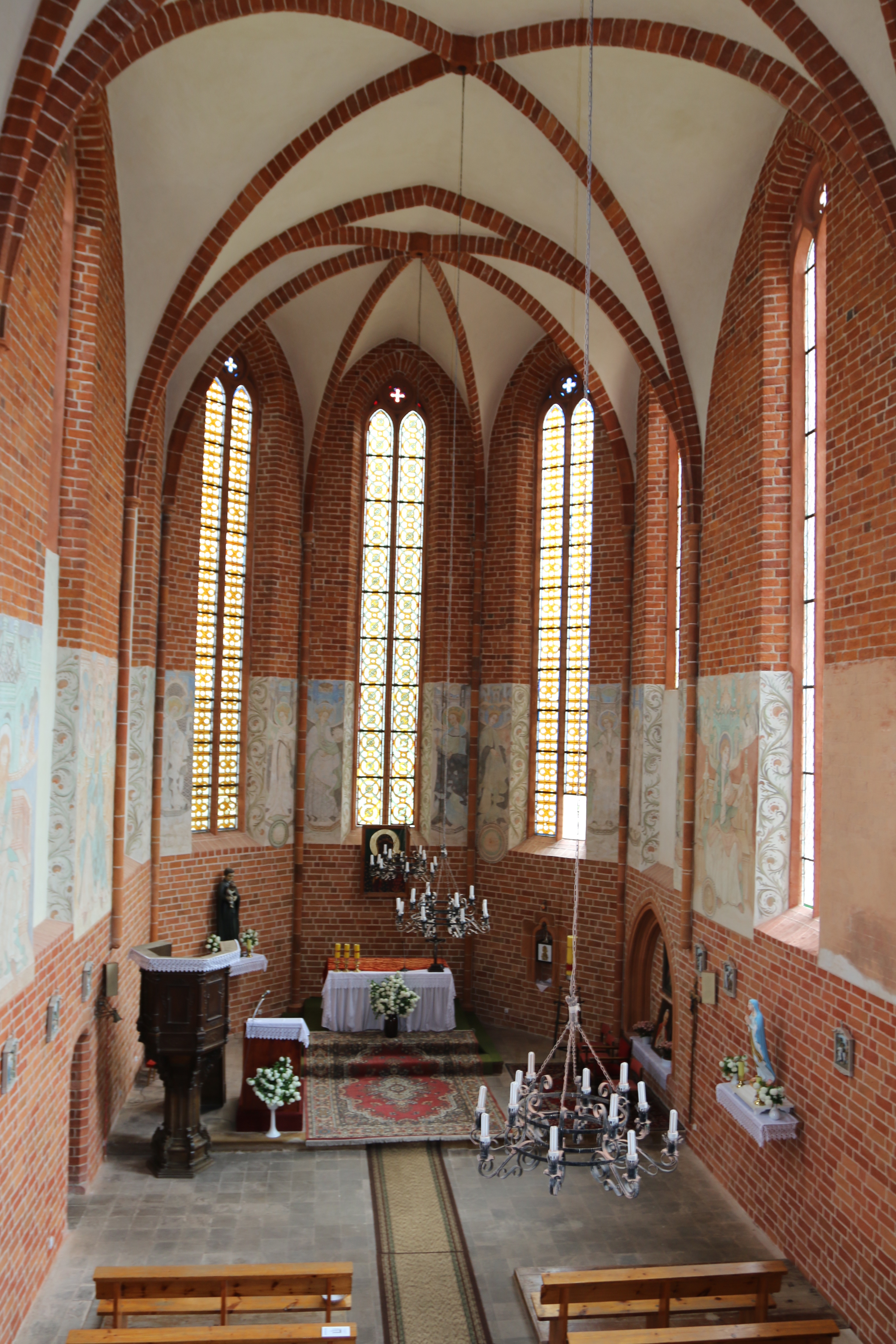 Kaplica Templariuszy w Chwarszczanach